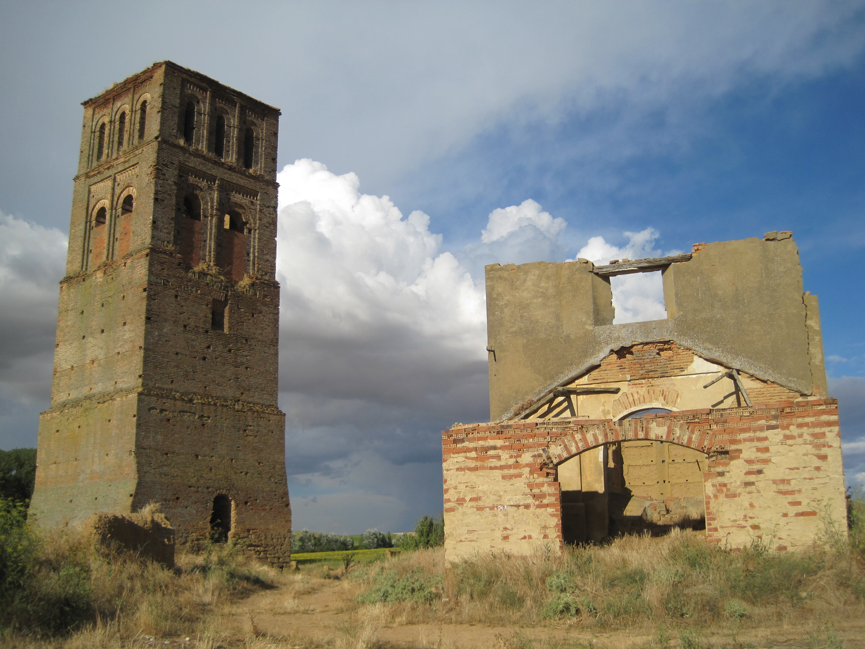 Despoblado de Villacreces (Valladolid, España).